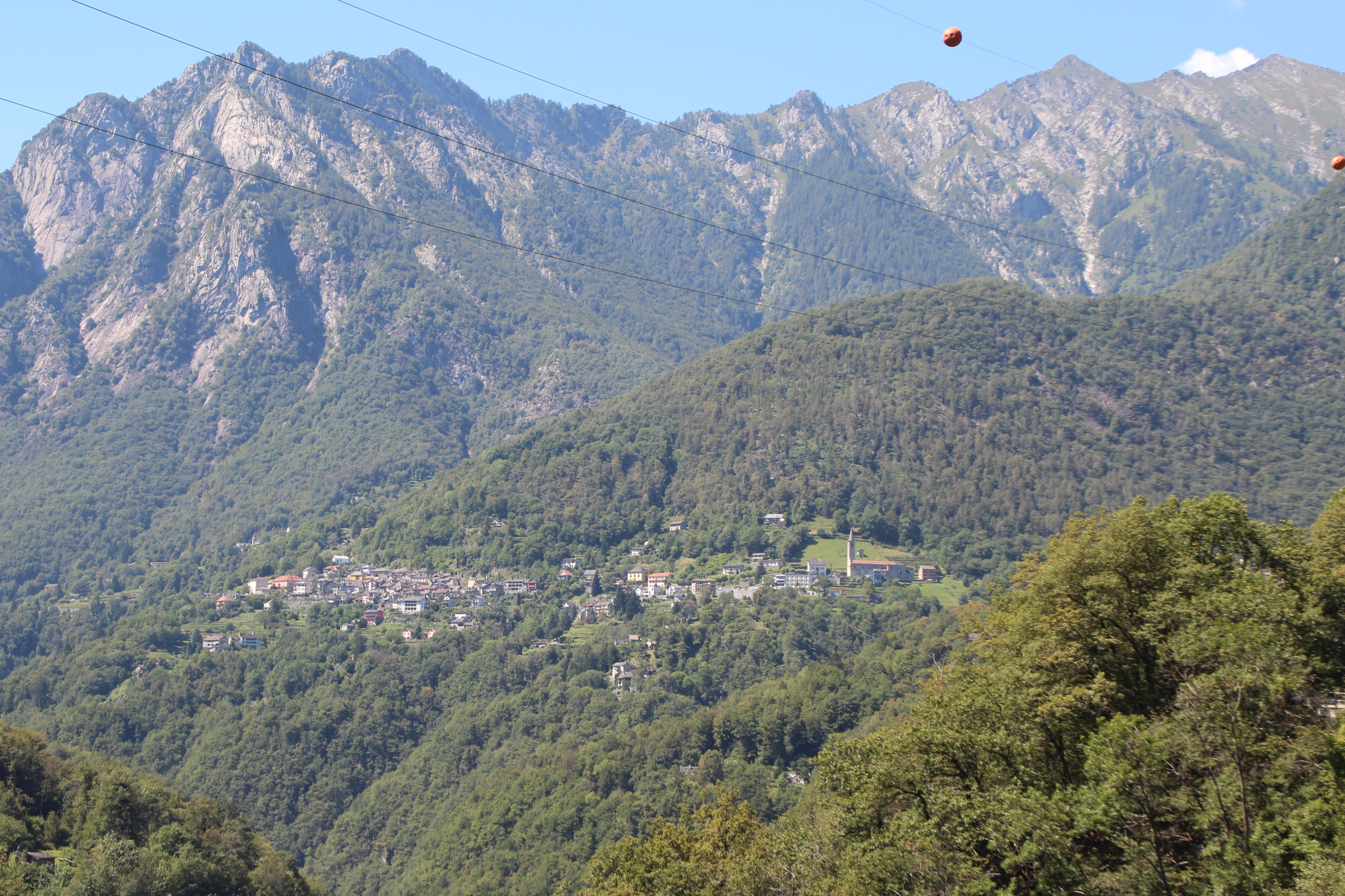 Isorno, Ortsteil Loco